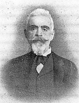 Ferri Domenico (1857-1940)